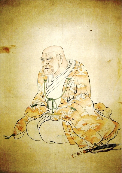 江戸時代後期の武士（旗本）・遠山景元の肖像画。